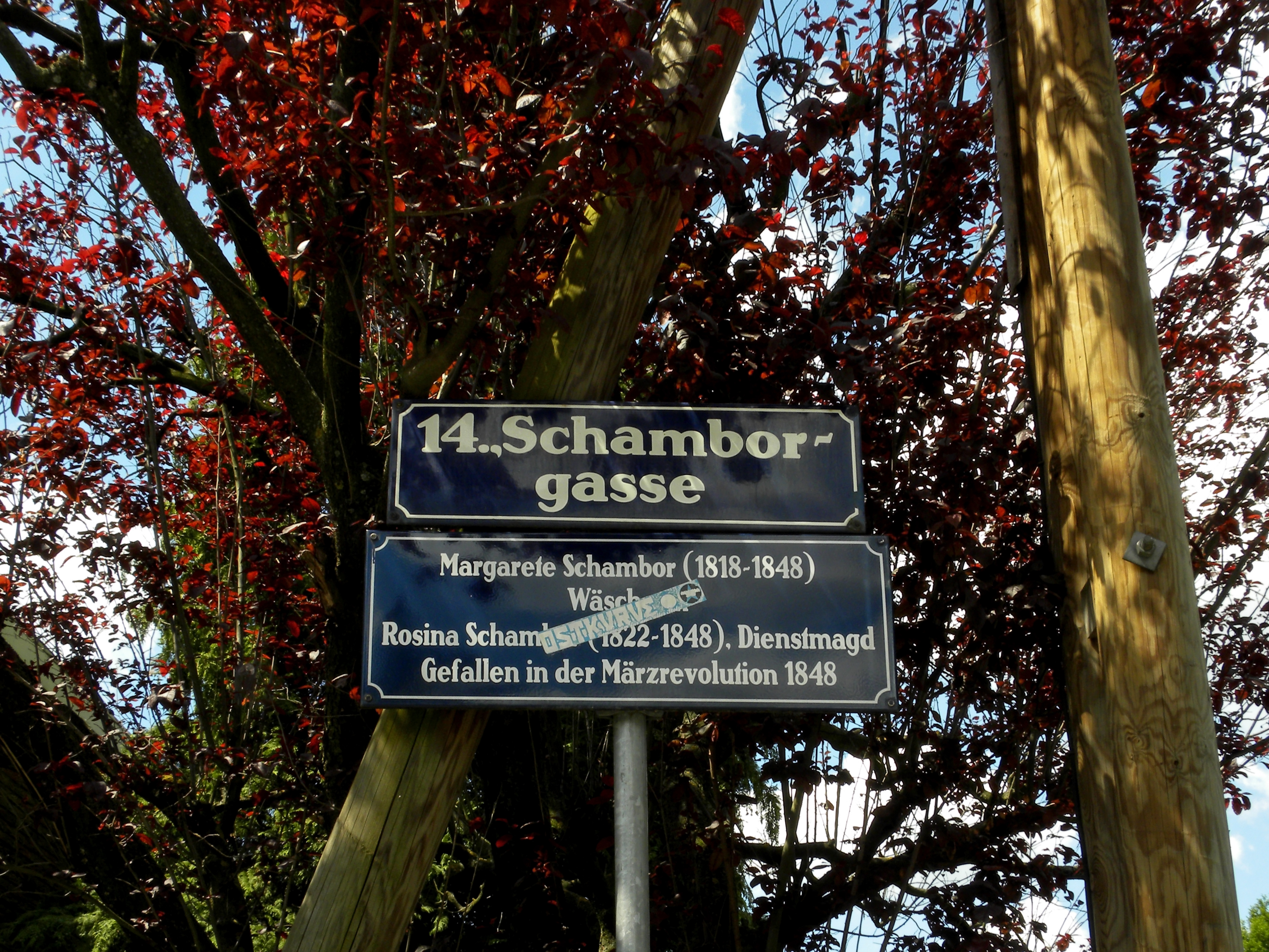 Die Straßen, Gassen und Wege rund um den an die Opfer der Märzrevolution von 1848 erinnernden Achtundvierzigerplatz in Wien Penzing, Breitensee, sind nach Gefallenen der Märzrevolution benannt.